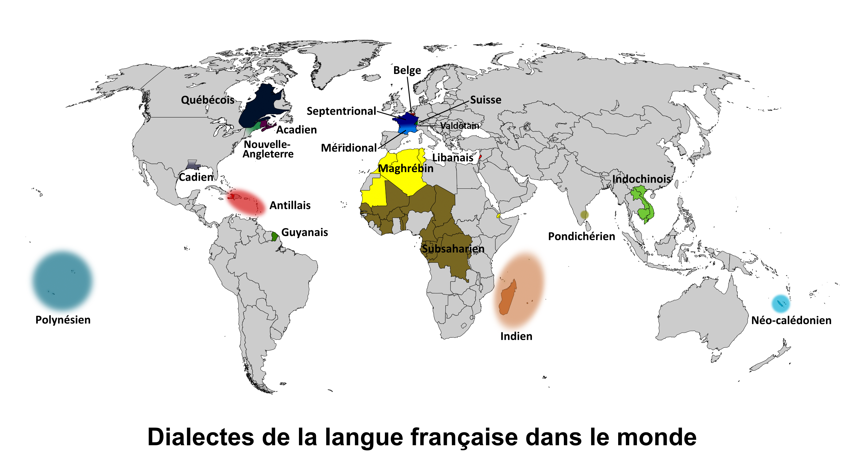 Dialectes de la langue française dans le monde